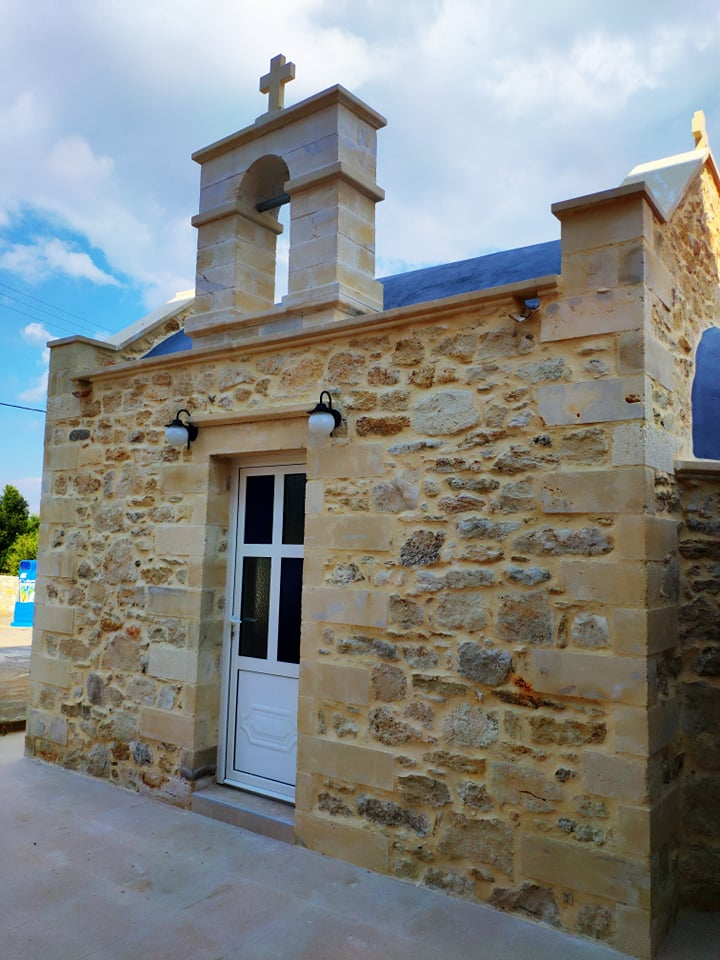 Ι. Ν. Αγίου Θεοχάρη, Ανισσαράς Λ. Χερσονήσου